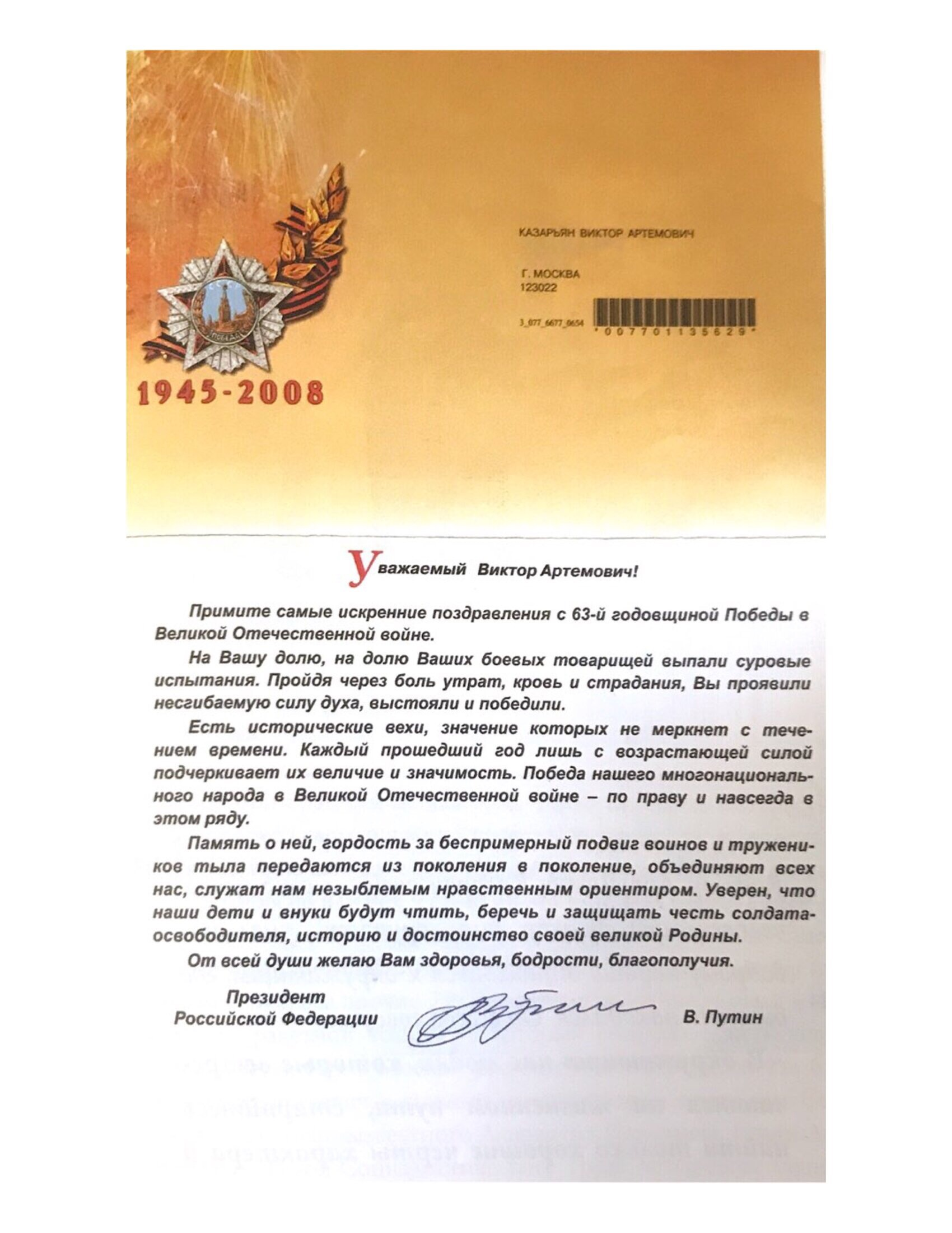 Поздравление с Днем Победы Президента Российской федерации В.В. Путина В. А. Казаряну